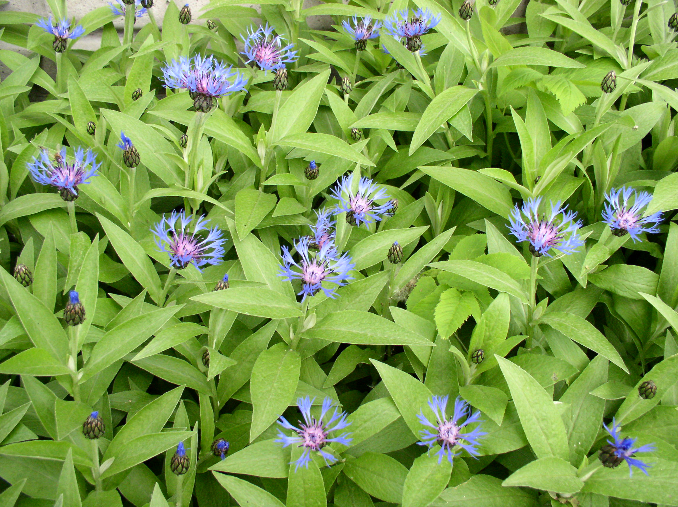 Centaurea montana